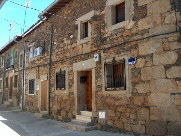 Casas en en casco antiguo de Hernán-Pérez